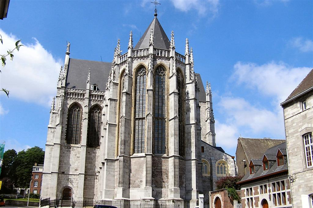 BRUNNER Emmanuel